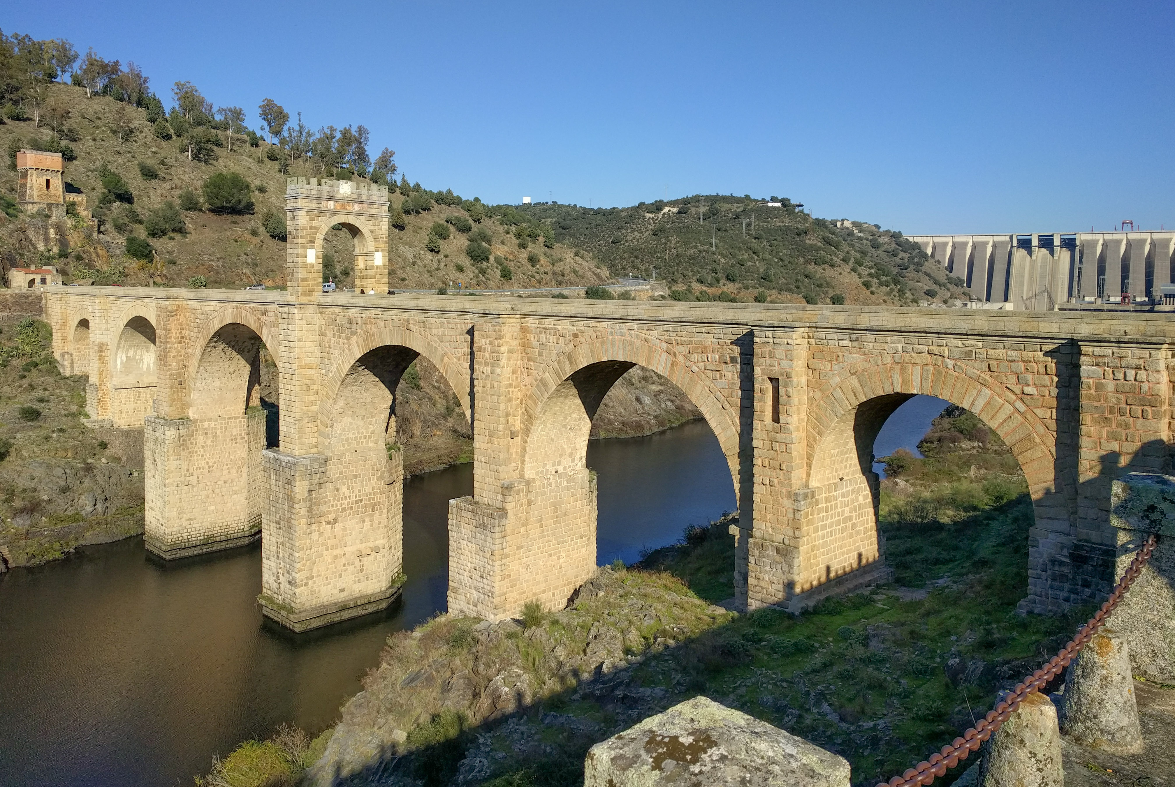 El puente de Alcántara, Cáceres, fotografiado desde la margen izquierda del río Tajo en diciembre de 2016